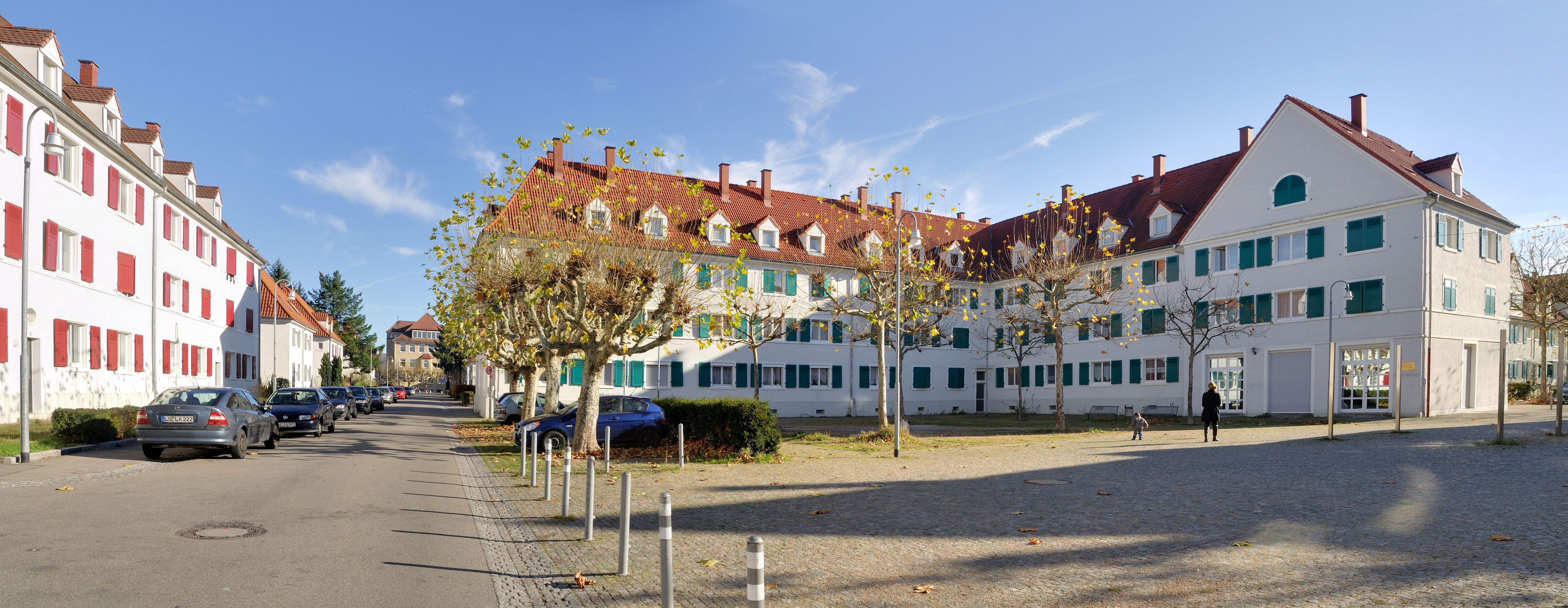 Weil am Rhein: Arbeiterwohnungen am Marktplatz (Ecke Gartenstraße/ Marktstraße), am Ende der Gartenstraße erkennt man das Gebäude der Leopoldsschule